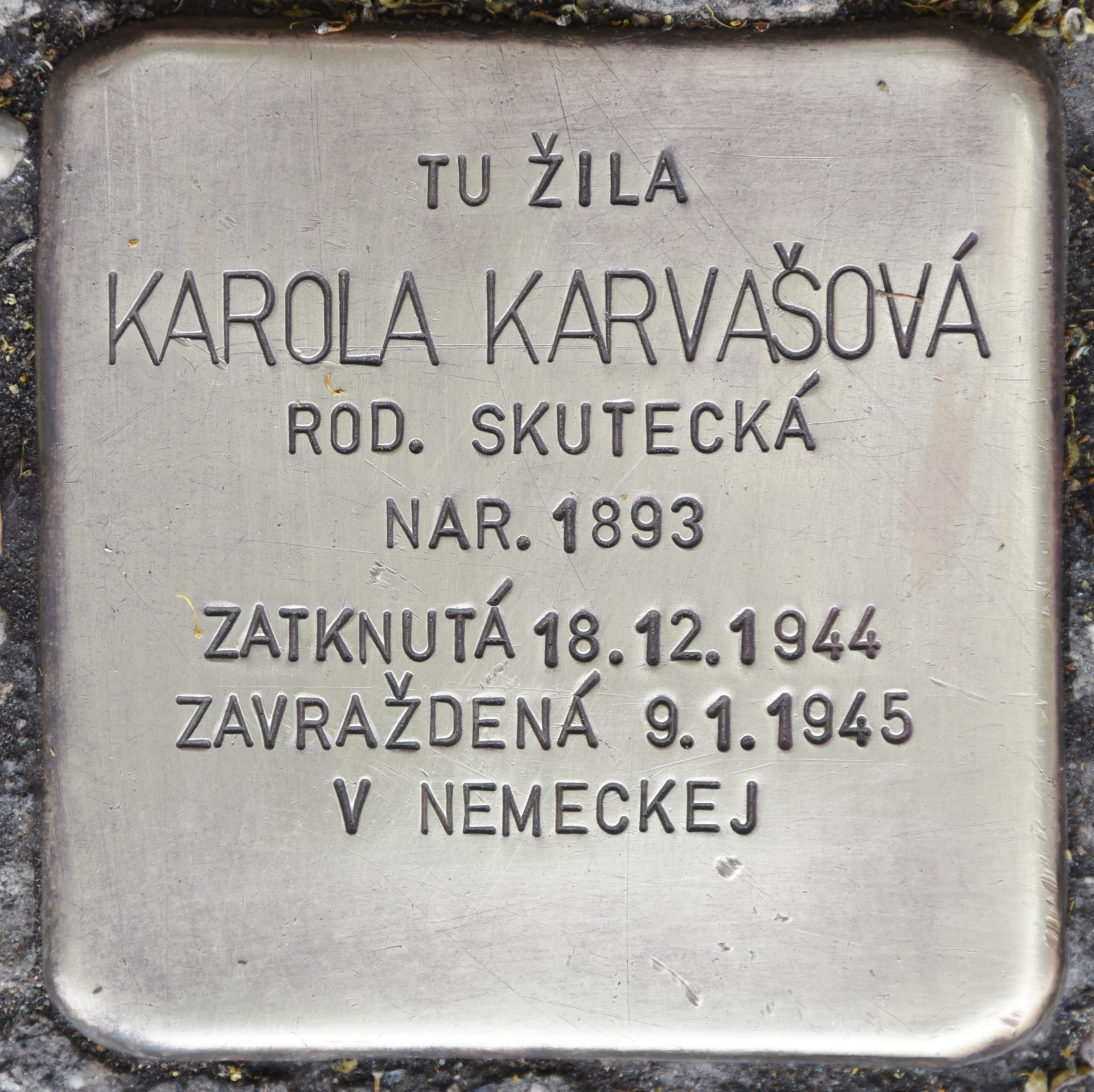 Stolperstein für Karola Karvasova